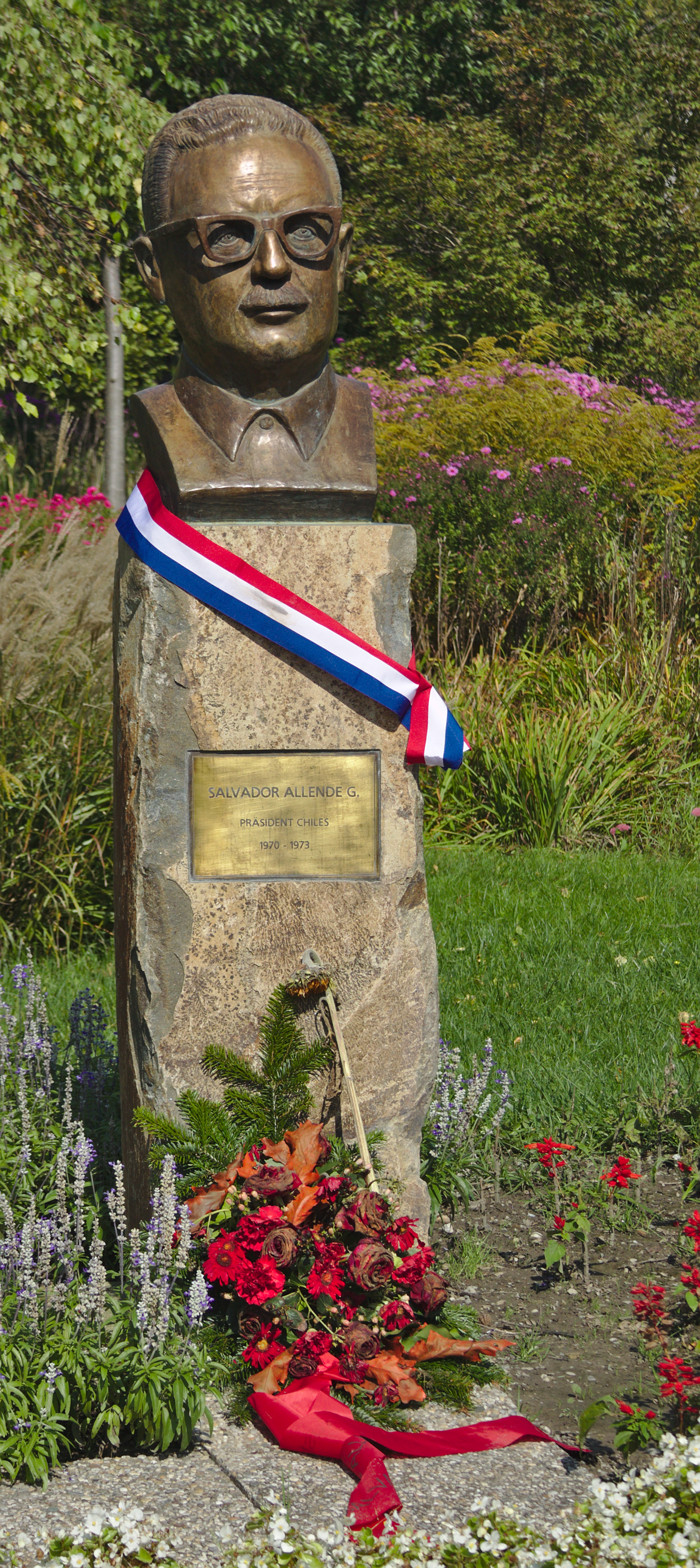 Donaupark, bauliche Gartenanlage und Kleindenkmäler